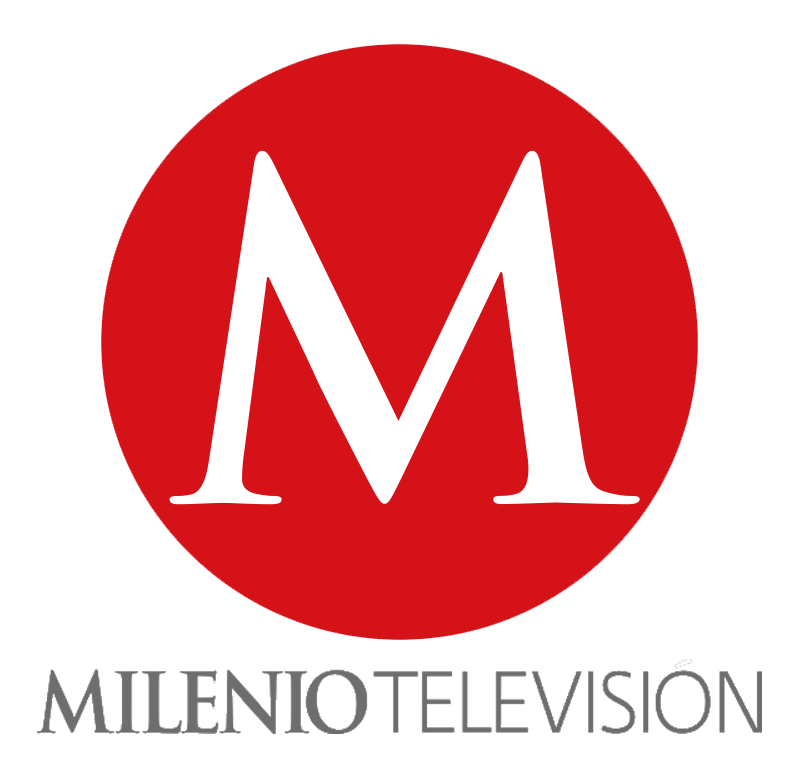 Logotipo de Milenio Televisión.